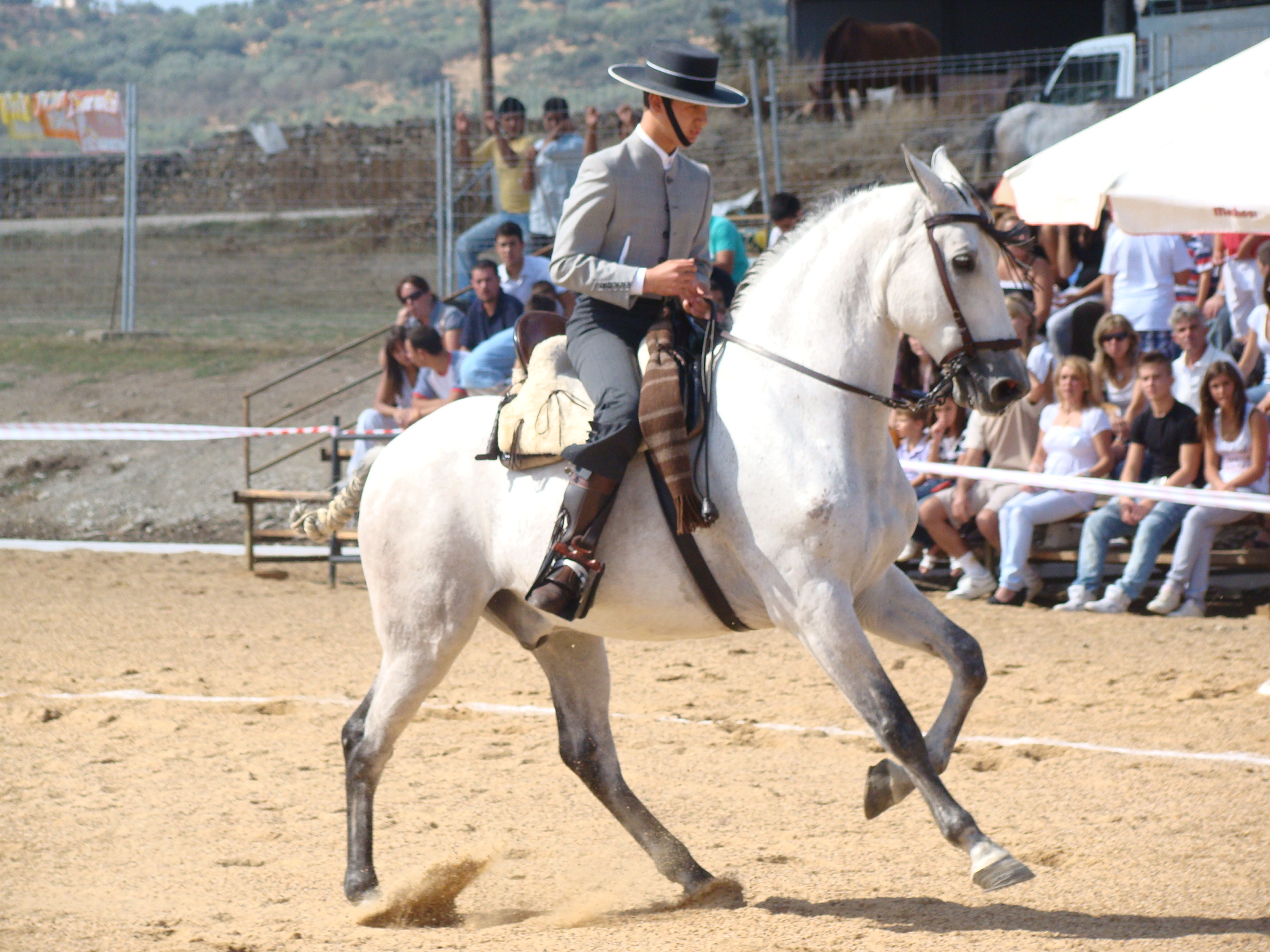 Doma Baquera Fregenal